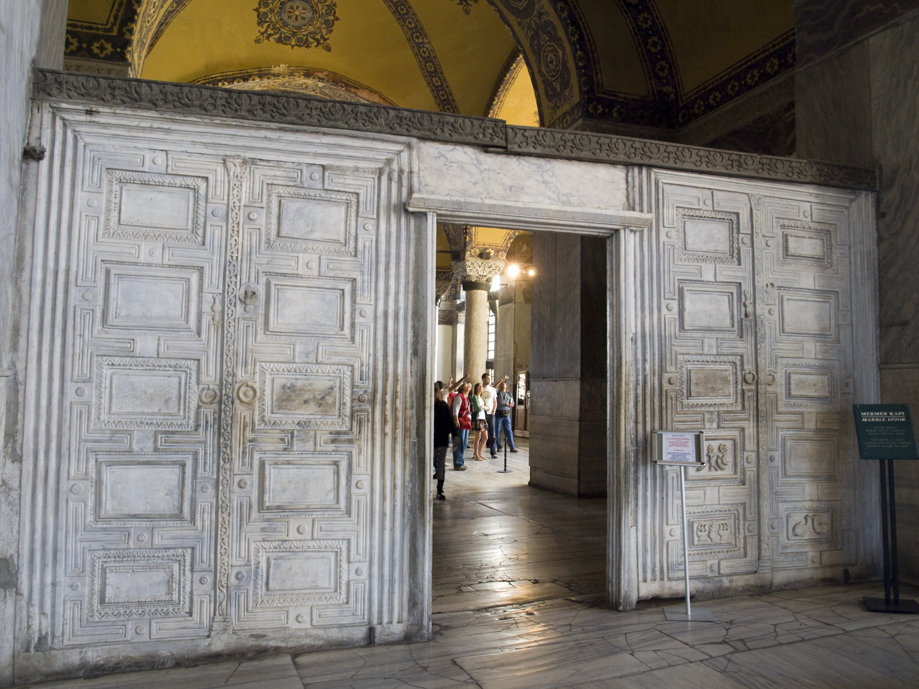 PB086184raw Istanbul, Turkey